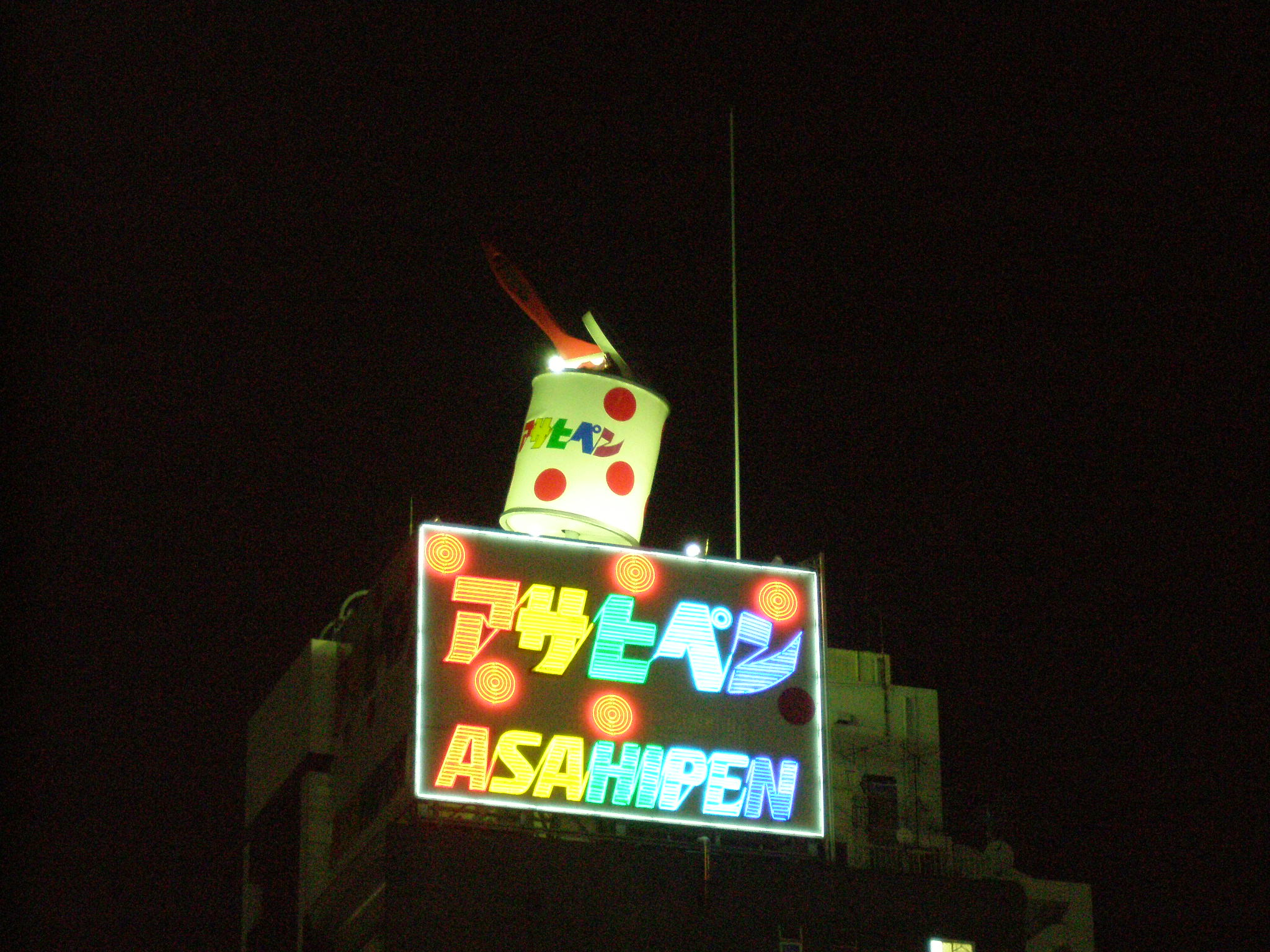 20070124_175844_P1240019